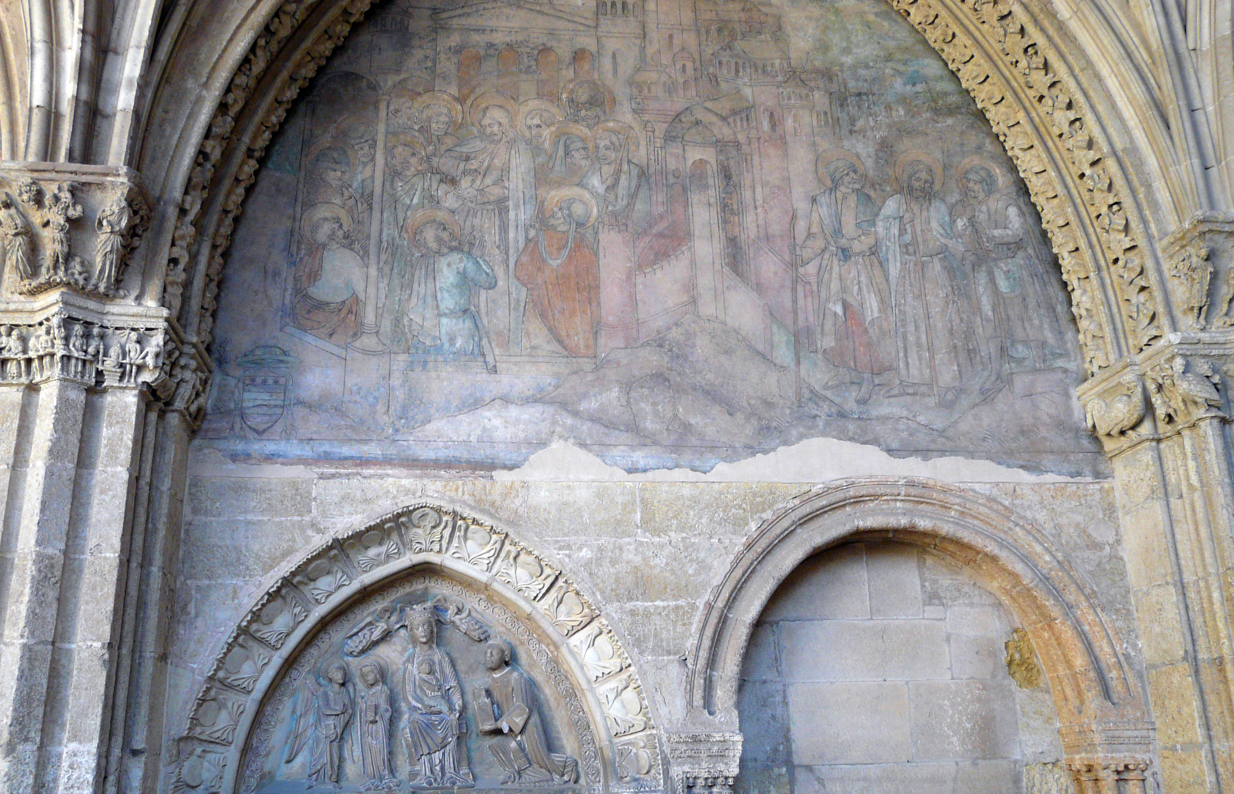 Pinturas de Nicolás Francés, catedral de León